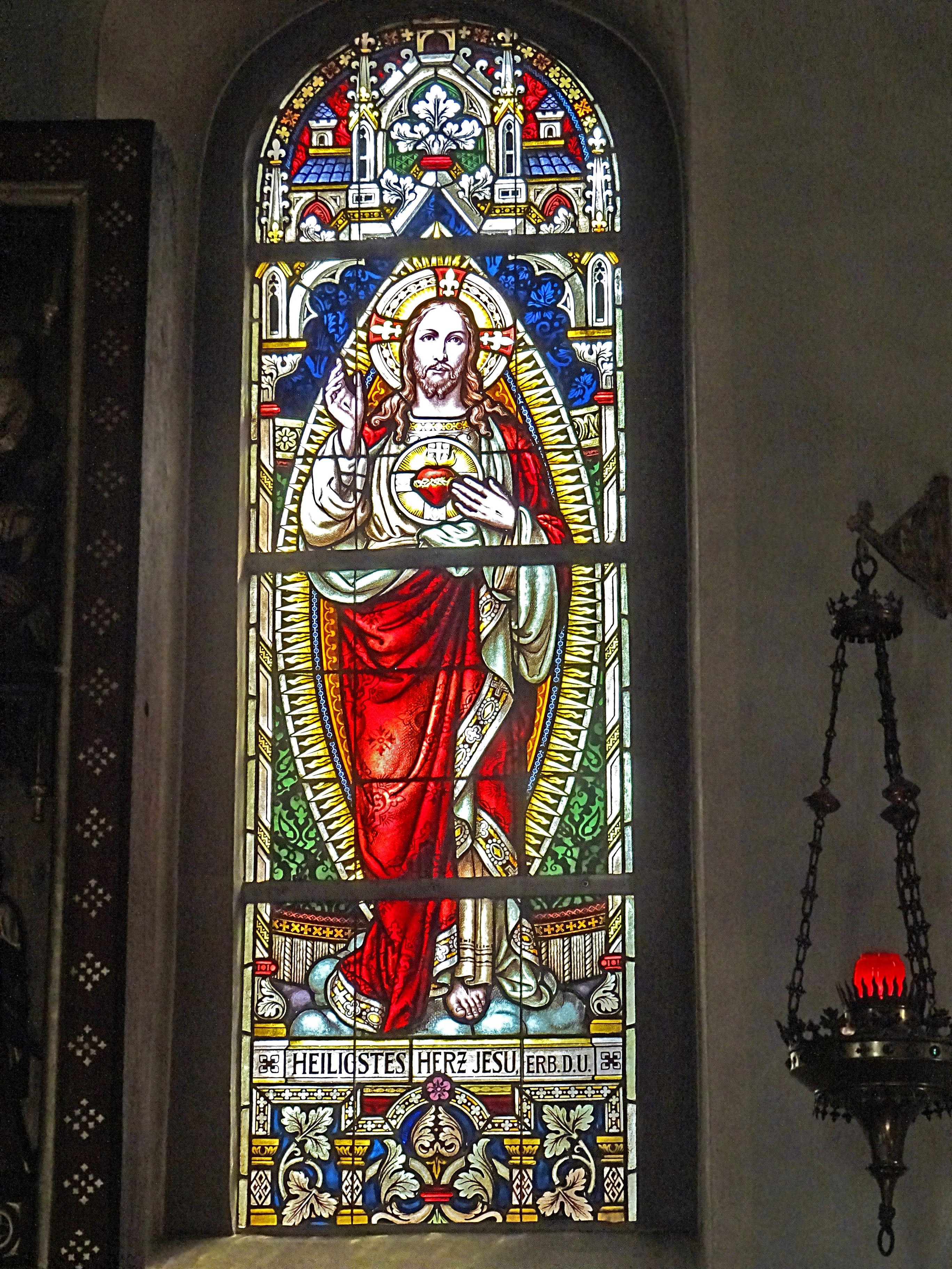 Buntglasfenster (rechtes Chorfenster) in der Nikolauskirche (Neuendorf)